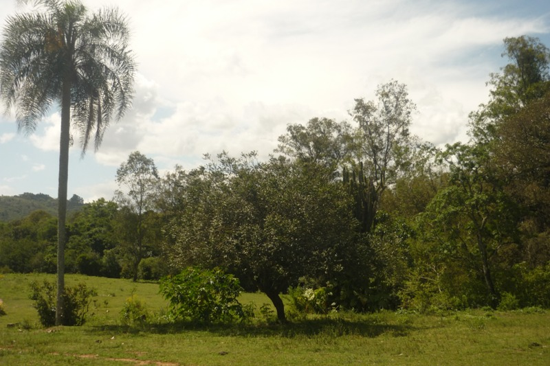 Imagem da paisagem natural, Belém Velho, POA/RS, Brasil.